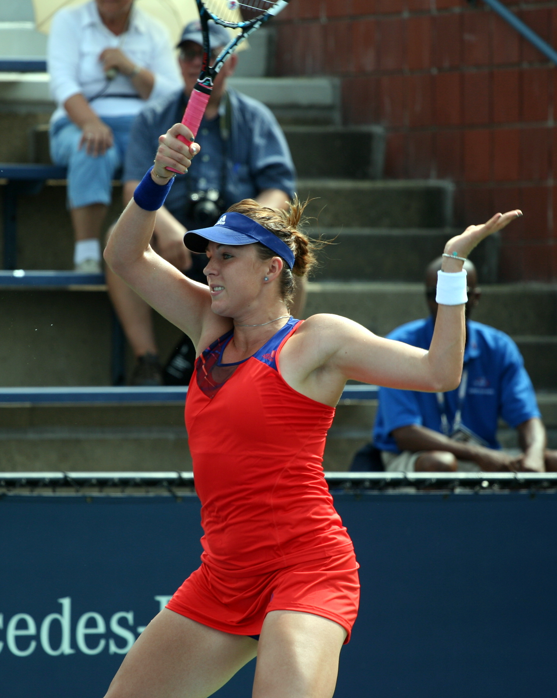 U.S. Open Wednesday, Aug. 28, 2013